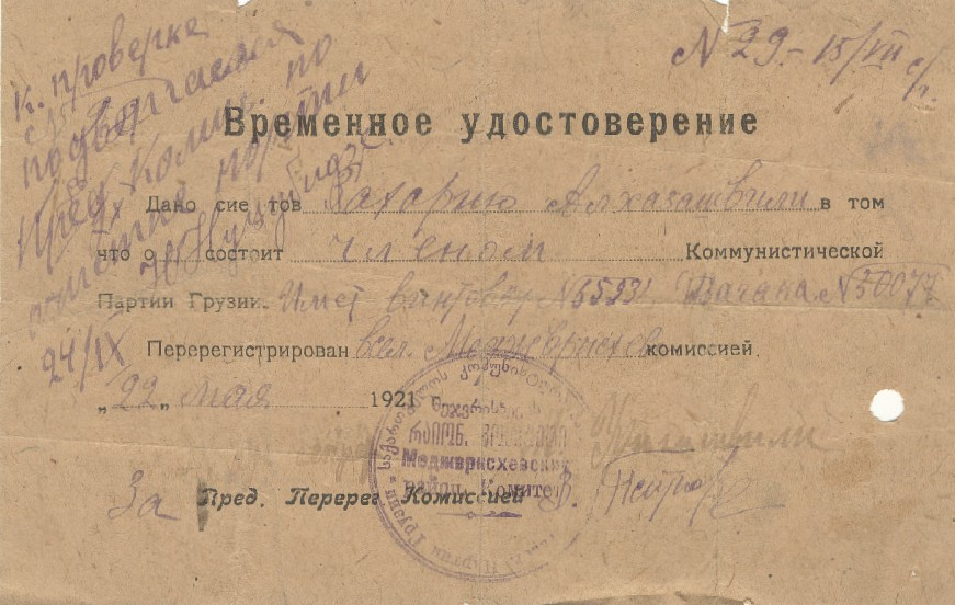 Удостоверение о прохождении партийной чистки